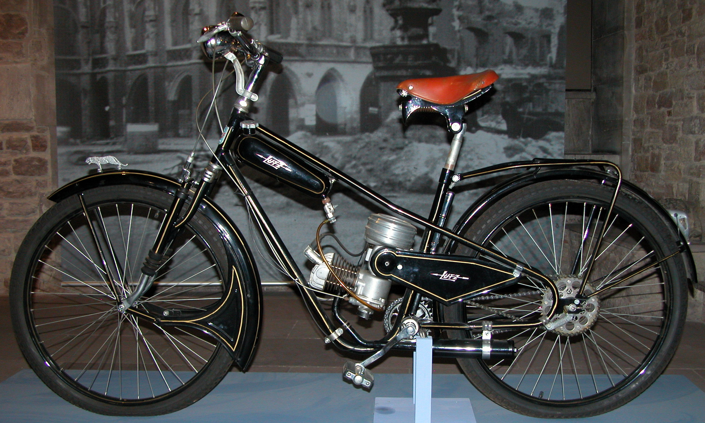 Braunschweig, Städtisches Museum, Altstadtrathaus: Seitenaufnahme LUTZ P 53, privates Moped von Otto Lutz.